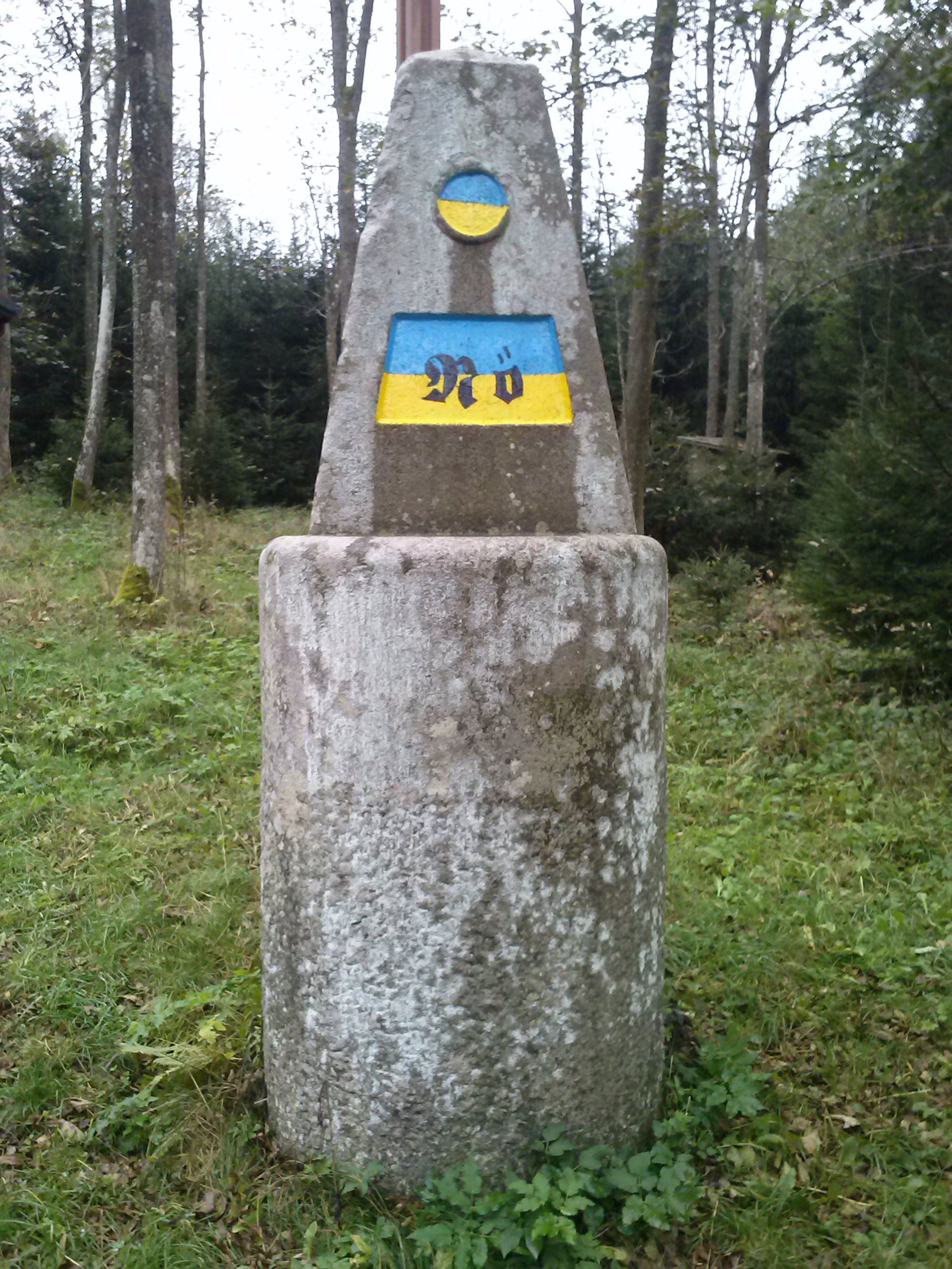 Dreiländerecke Burgenland, Steiermark und Niederösterreich: Grenzstein - Seite Niederösterreich